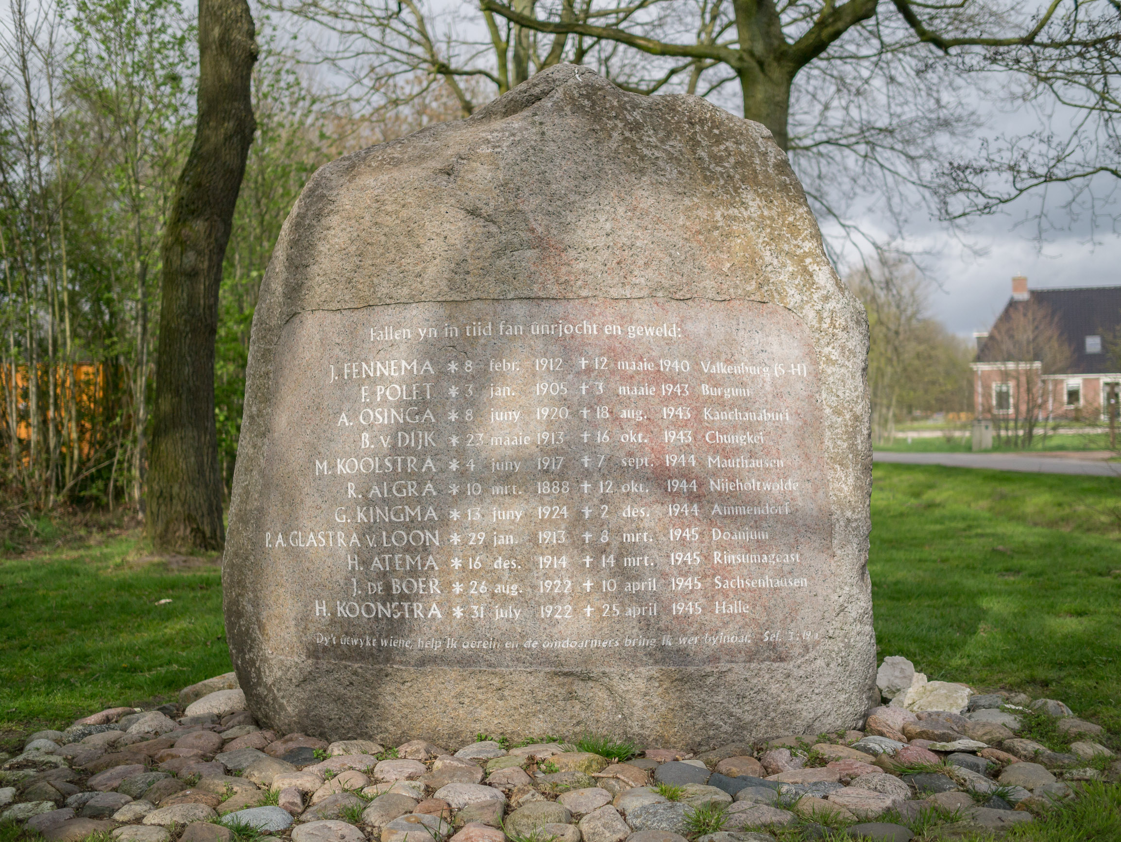 Rinsumageest, oorlog monument aan de Eysingaweg